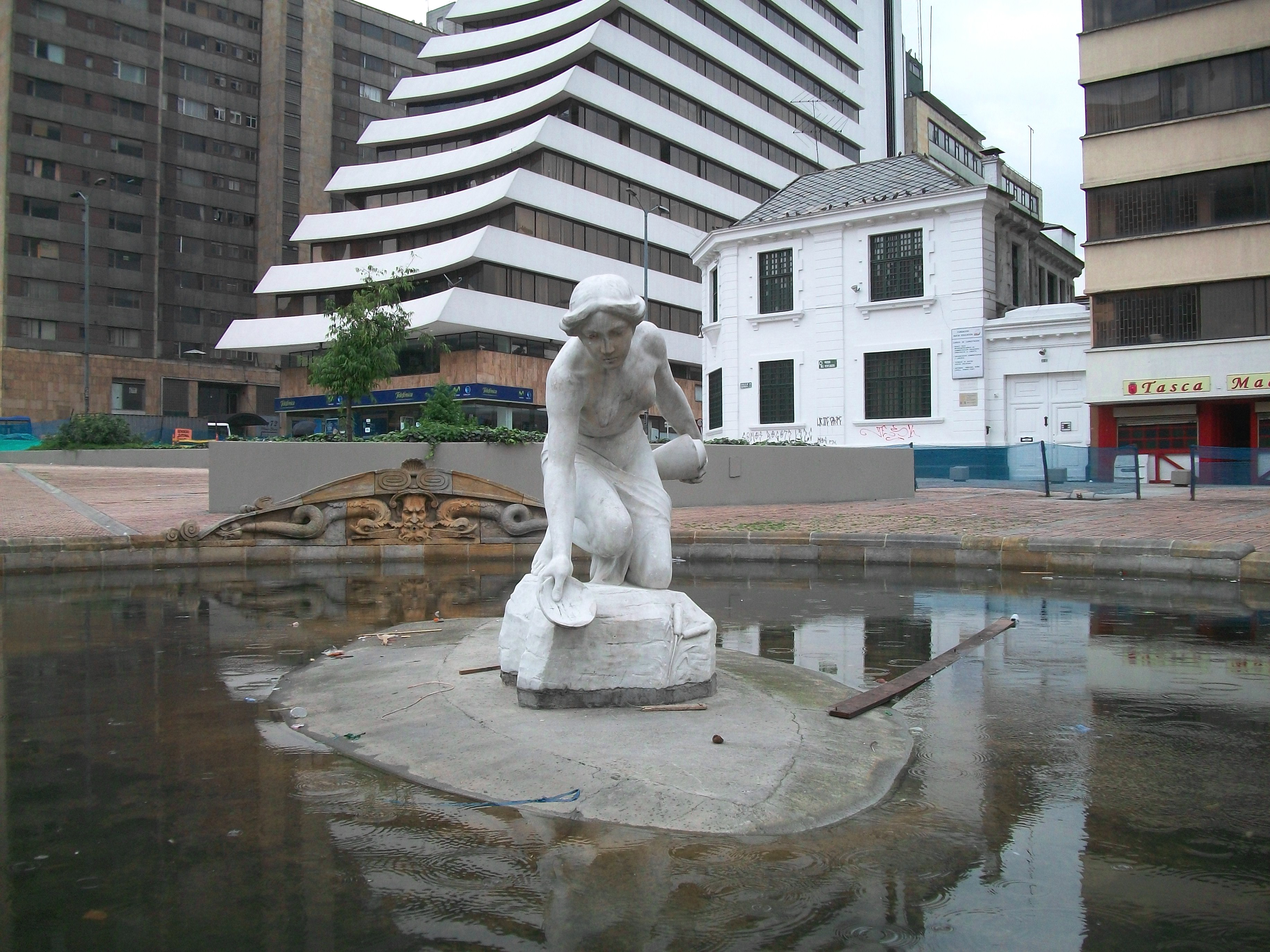 La Rebeca, Bogotá, costado oriental.